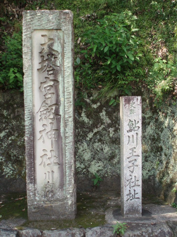 鮎川王子址碑（右）および大塔宮剣神社碑（左）